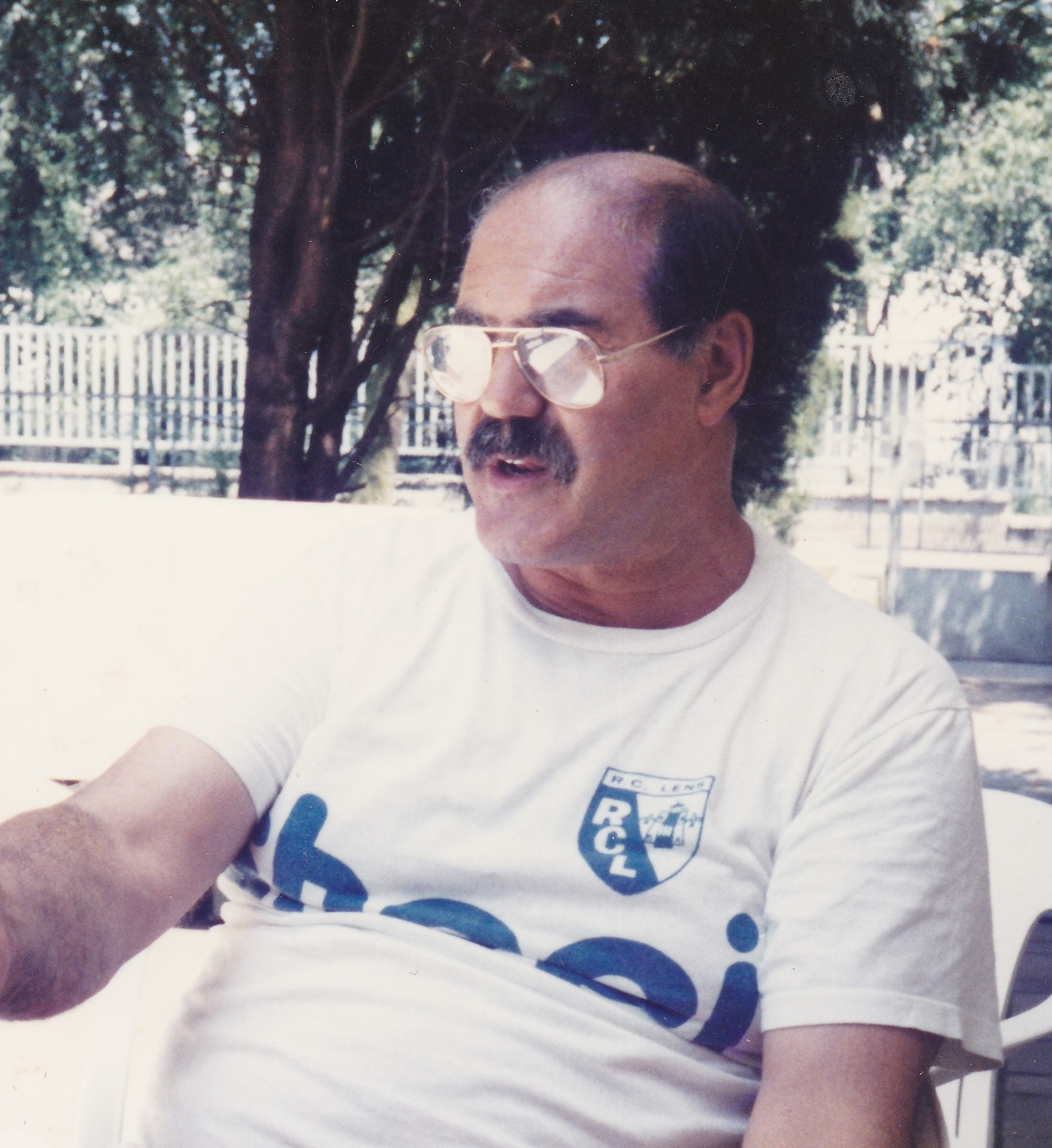 Ahmed Oudjani en 1997